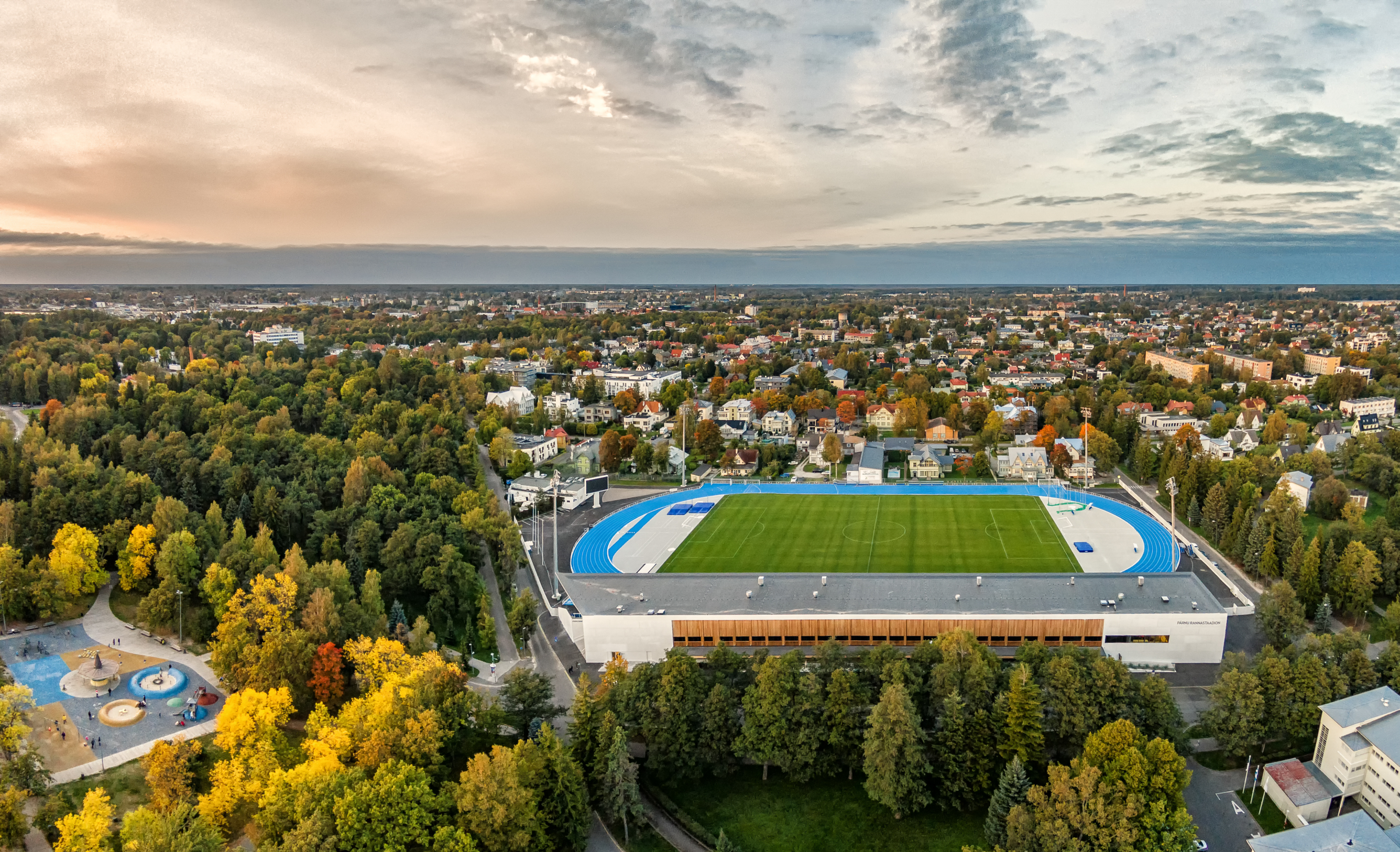 Pärnu Rannastaadion